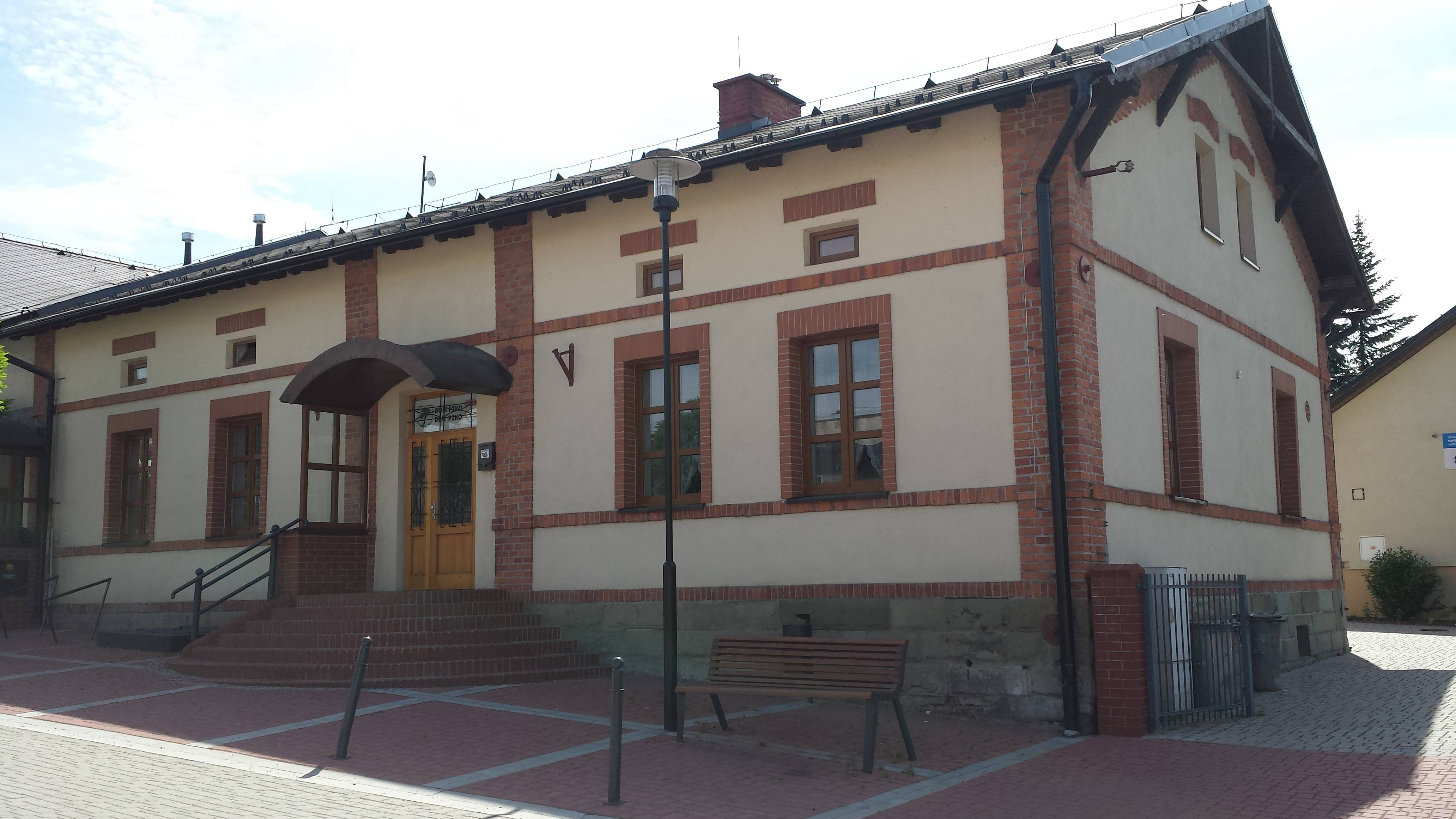 Fotografia z czerwca 2015 roku